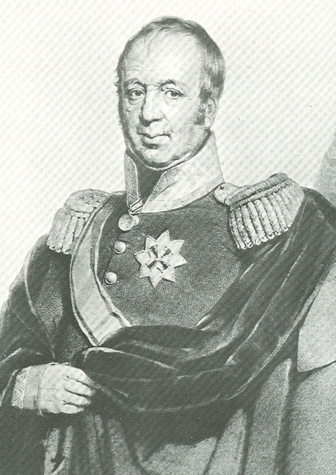 portret van Leopold van Limburg Stirum